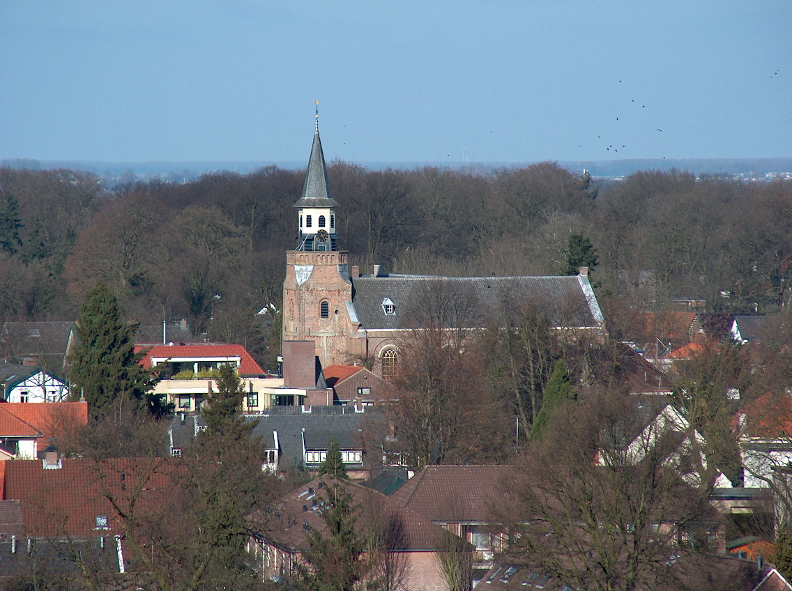 Eigen foto